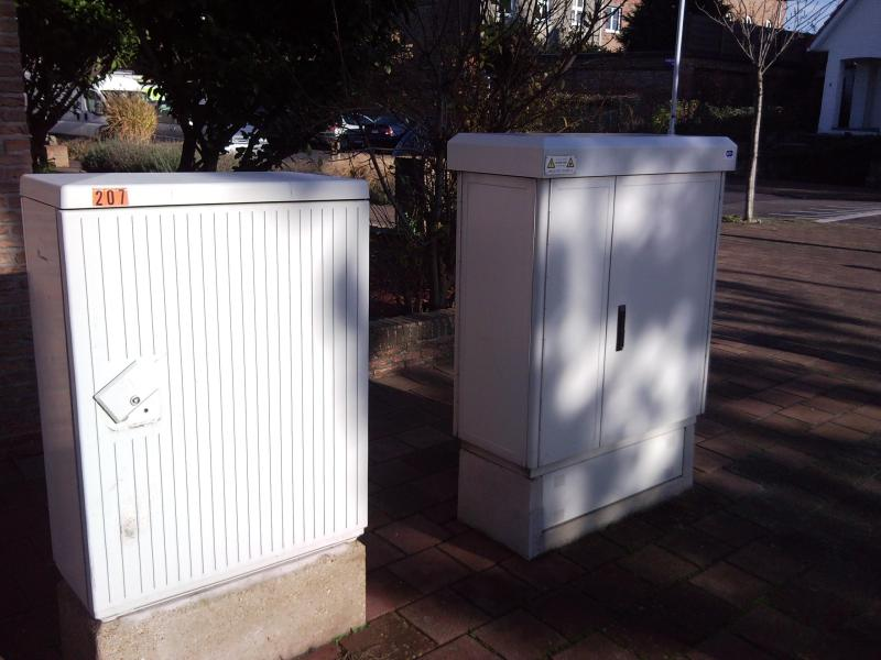 Foto met links een gewone kabelverdeelkast en rechts een remote optical platform (ROP)